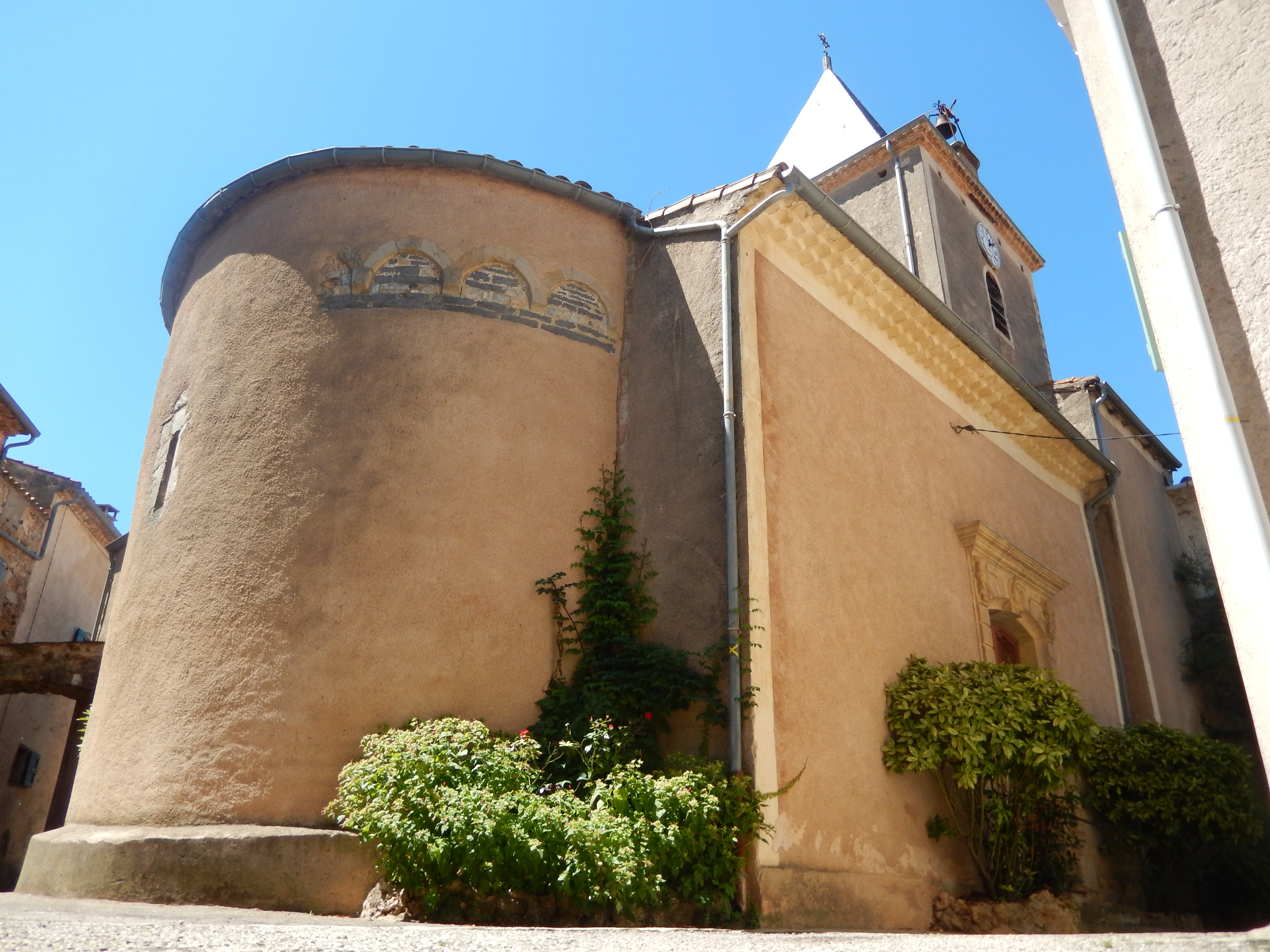 Vue en contre-plongée de l'église Saint-Geniès-d'Arles de Salasc (Hérault, France).